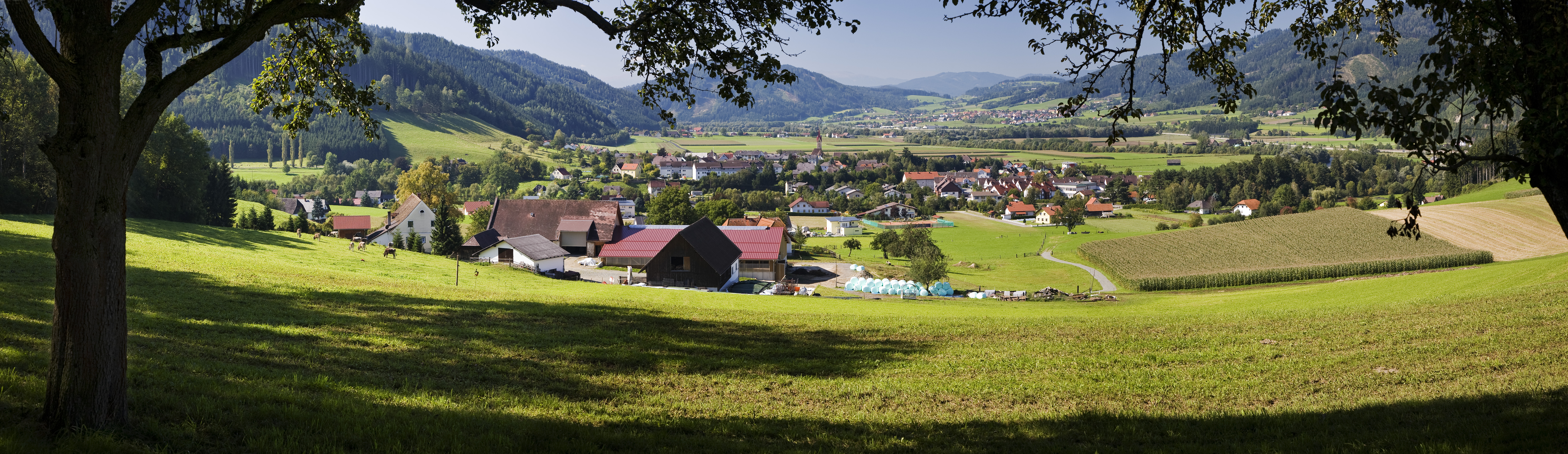 St. Stefan ob Leoben von Nordosten. Aufnahme vom Kamsberg. Im Hintergrund Mittagkogel und der Tremmelberg mit der Aussichtswarte